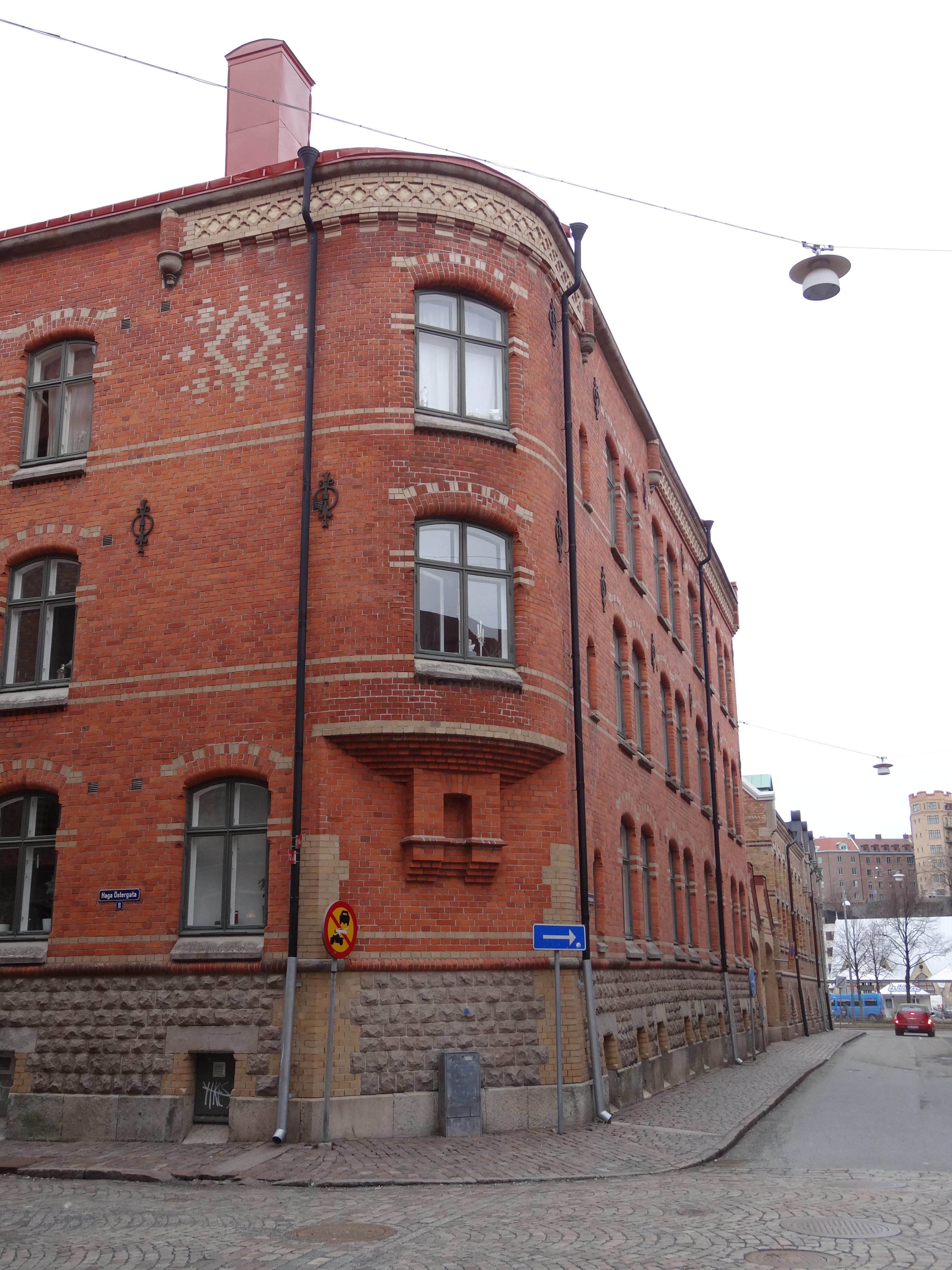 Kvarteret Majoren i Haga i Göteborg. Bostadshus vid Kaponjärgatan 2B, Kaponjärgatan 2C, Kaponjärgatan 2D.